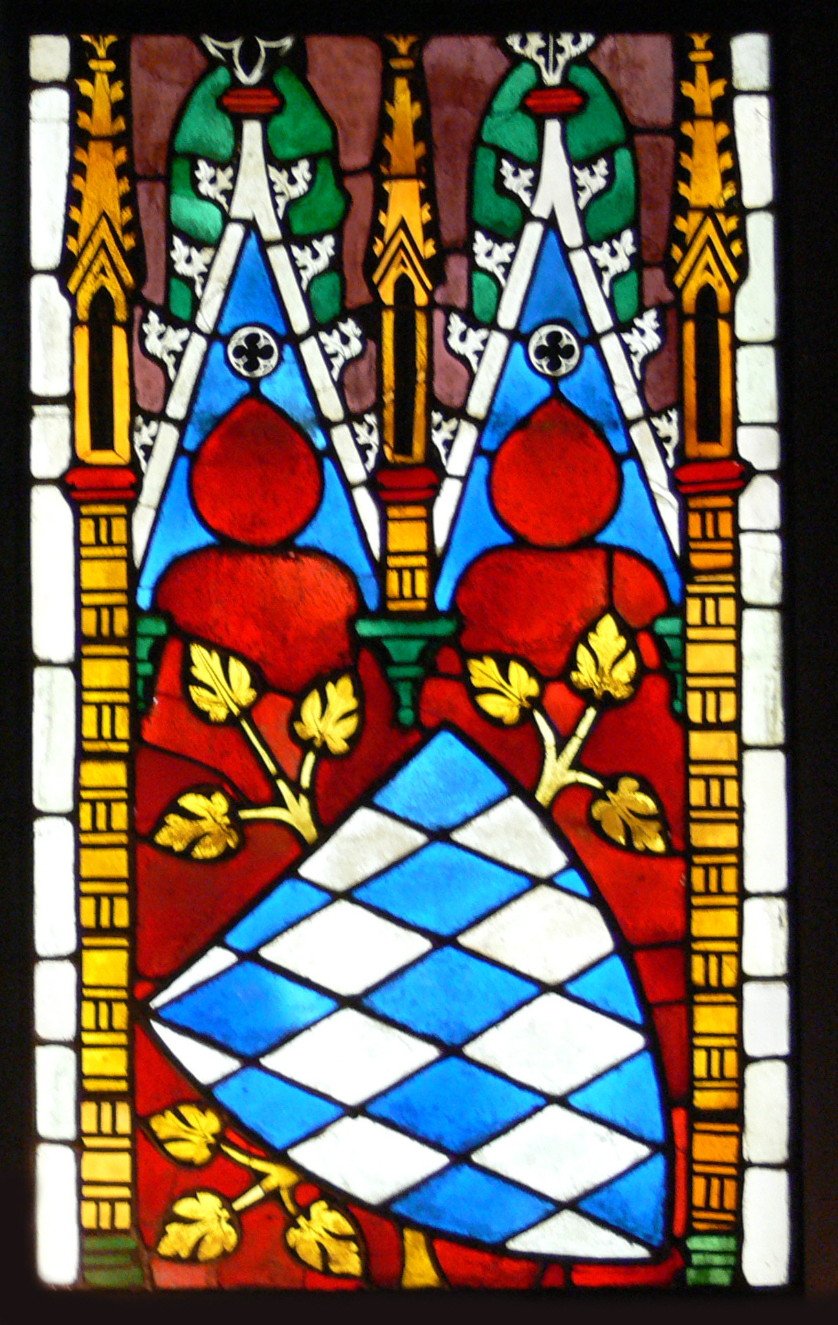 München, Bayerisches Nationalmuseum: Eine von zehn Glasscheiben aus Kloster Seligenthal bei Landshut, 1. Viertel 14. Jahrhundert, Inv. Nr. G. 914-923, erworben 1860. Wappenscheibe